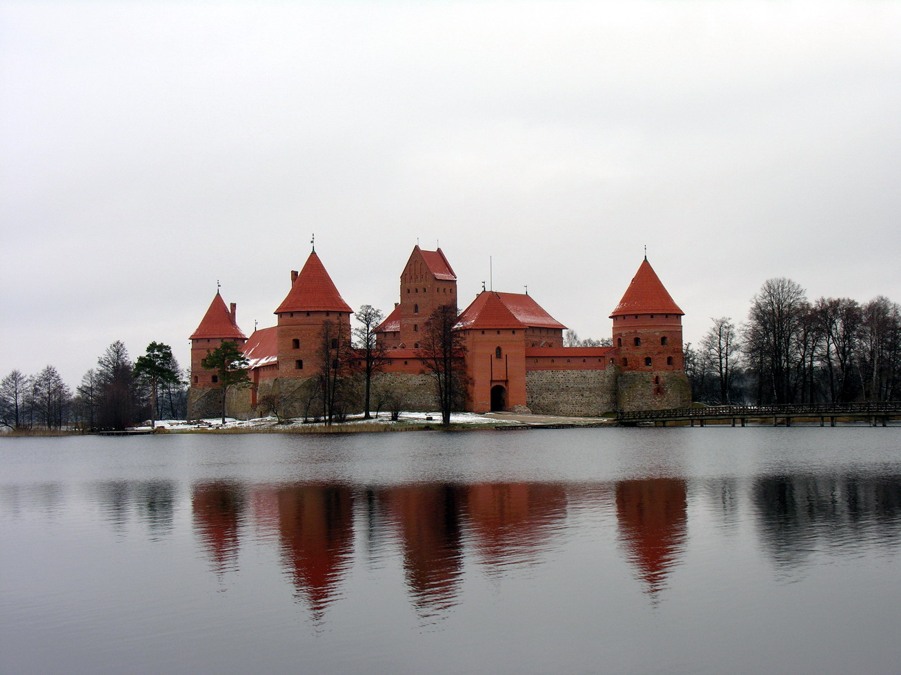 Žemaitėška: Trakū pėlės, 2007 m. lapkrėtė 16 d.